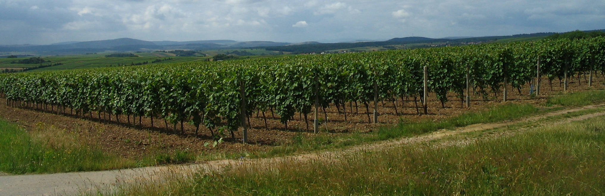 Das Naheland